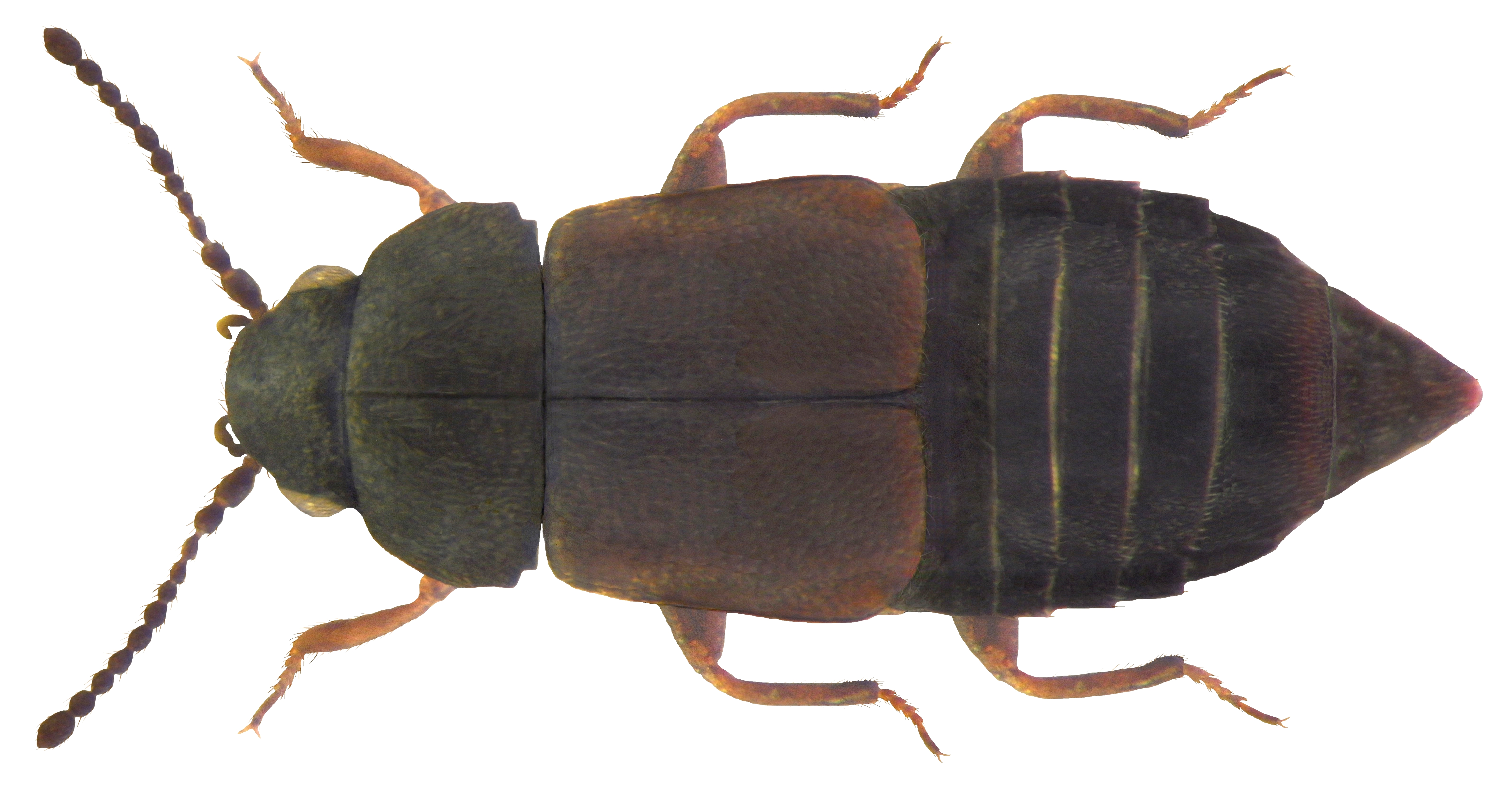 Familie: Staphylinidae Groesse: 2,5-3 mm Verbreitung: Europa Ökologie: an faulenden Pflanzen Fundort: Germania, Bayern, Oberfranken, Kulmbach leg.det. U.Schmidt, 1982 Photo: U.Schmidt, 2010